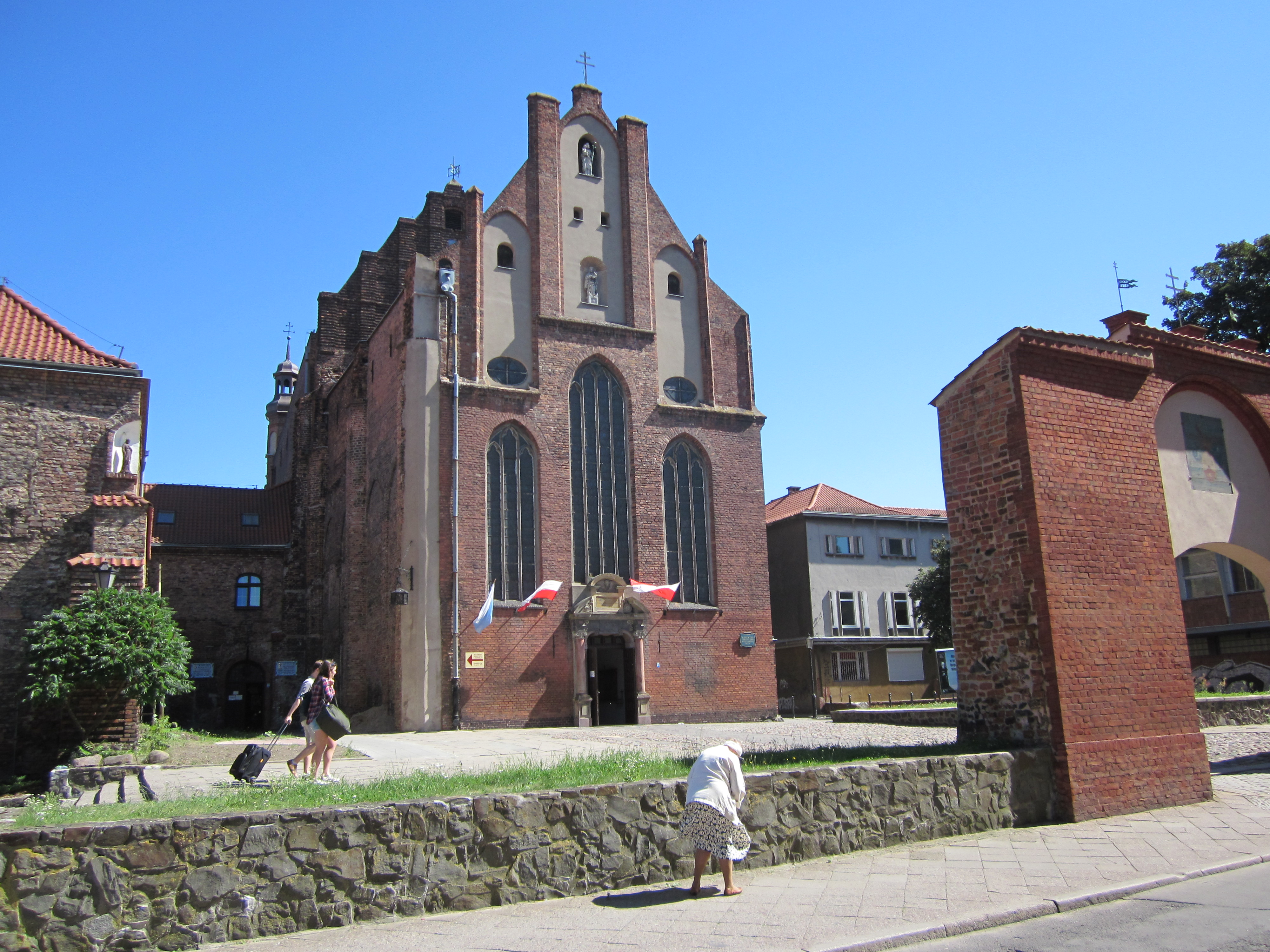 Gdańsk Stare Miasto, ul. Elżbietańska 9/10 - rzymskokatolicki kościół rektorski misjonarzy oblatów, pw. Św. Józefa w zespole klasztornym karmelitów, ob. oblatów.